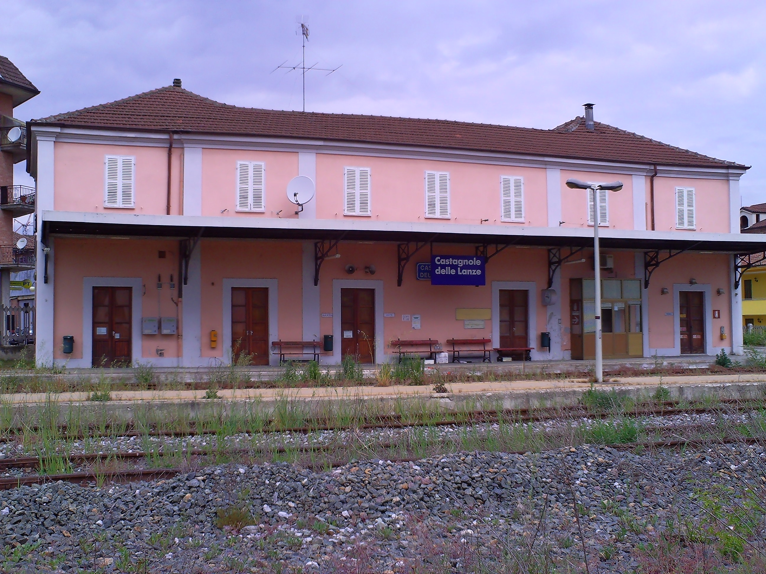 La stazione di Castagnole delle Lanze (AT), Italia.